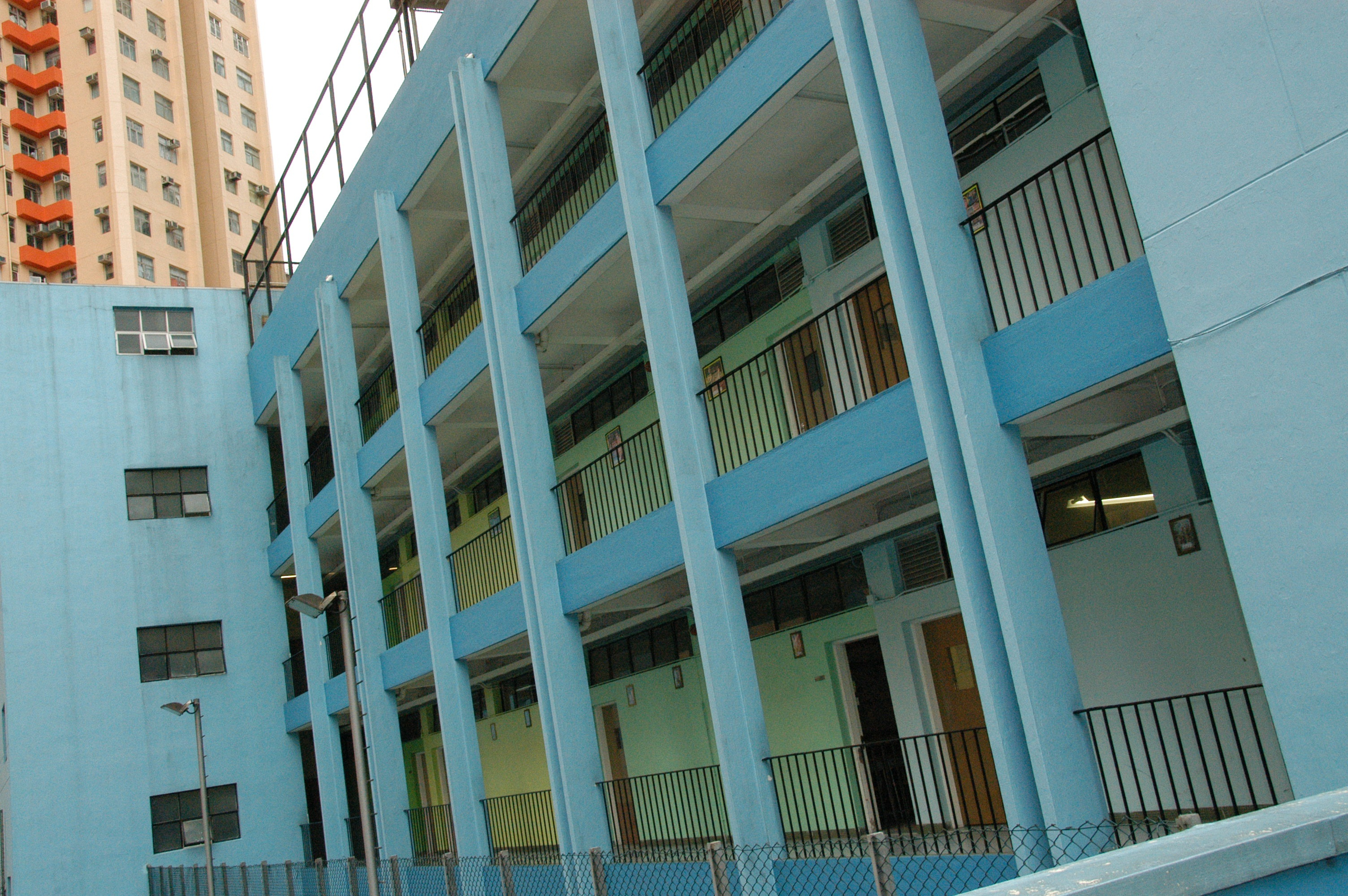 瑪利諾中學外觀.jpg